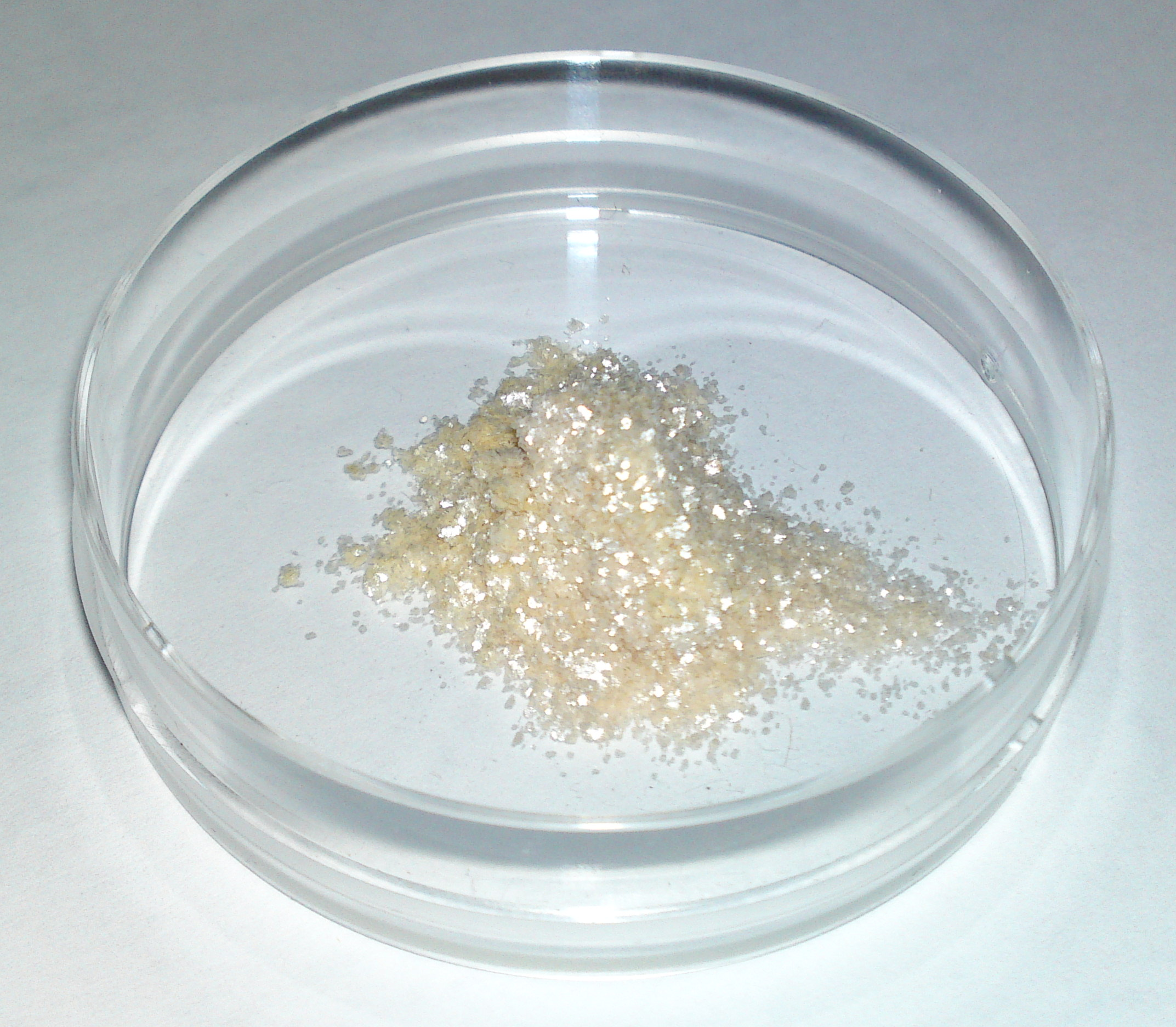 Benzimidazolon in Petrischale